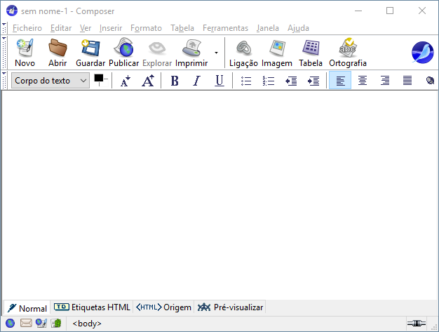 O SeaMonkey Composer versão 2.46 rodando no Windows 10.